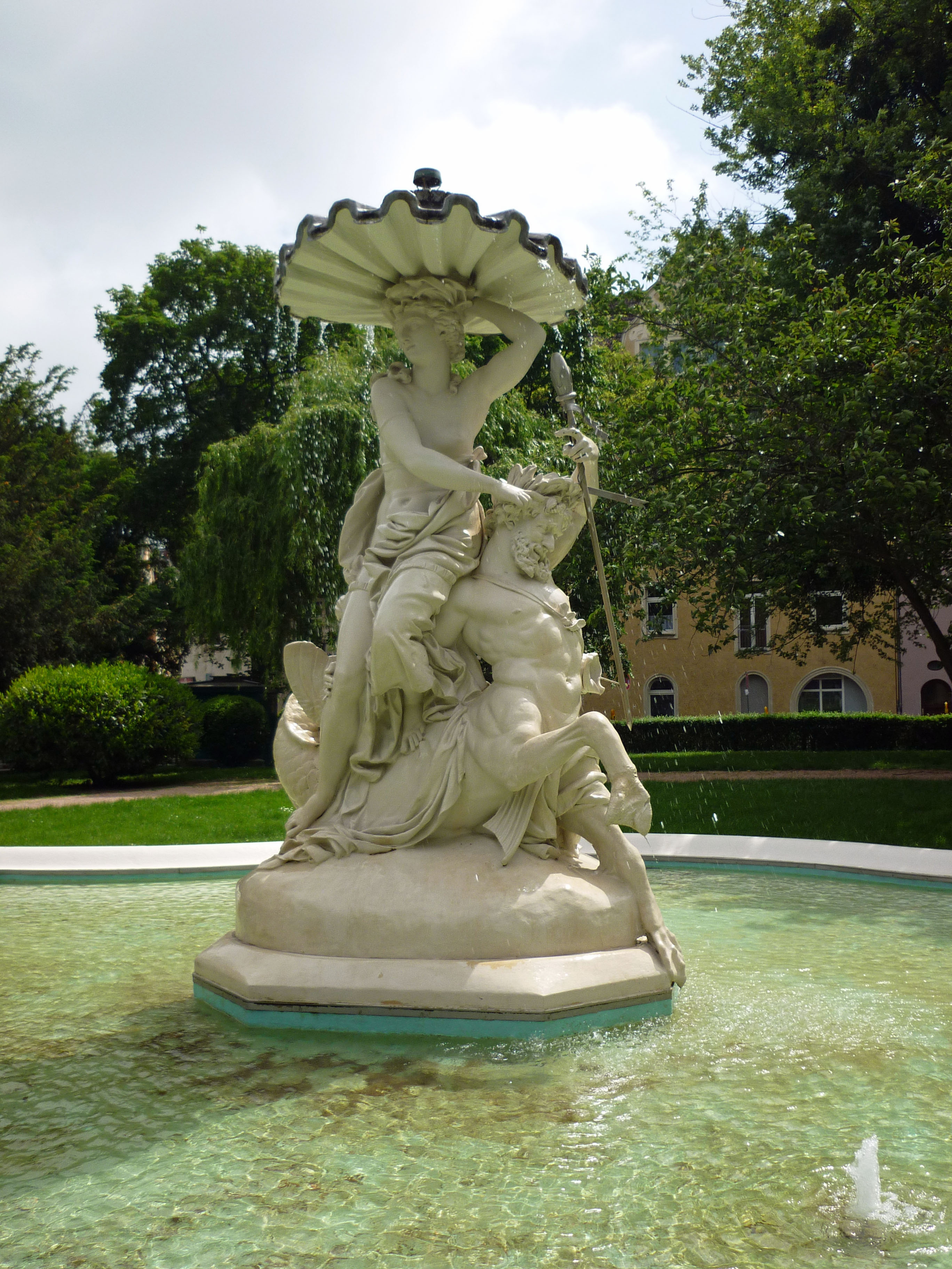 Galatea-Brunnenanlage in Wiesbaden-Biebrich.